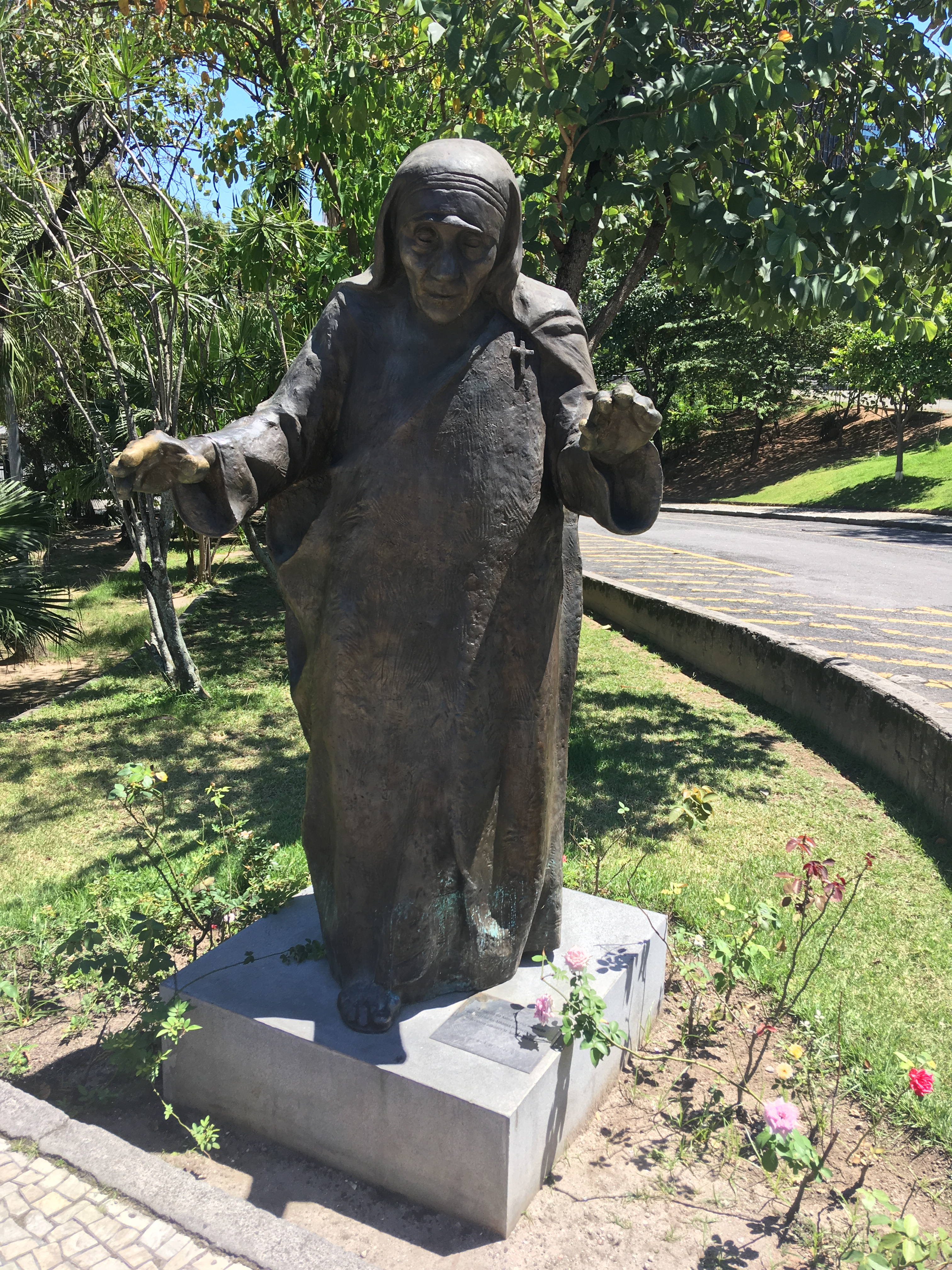 Estátua da Santa Teresa, localizada na calçada em frente a Catedral de São Sebastião do Rio de Janeiro.